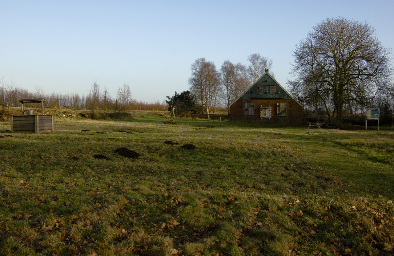 Huisje van Uneken in het Bargerveen. Door Staatsbosbeheer bestemd tot insectenhotel